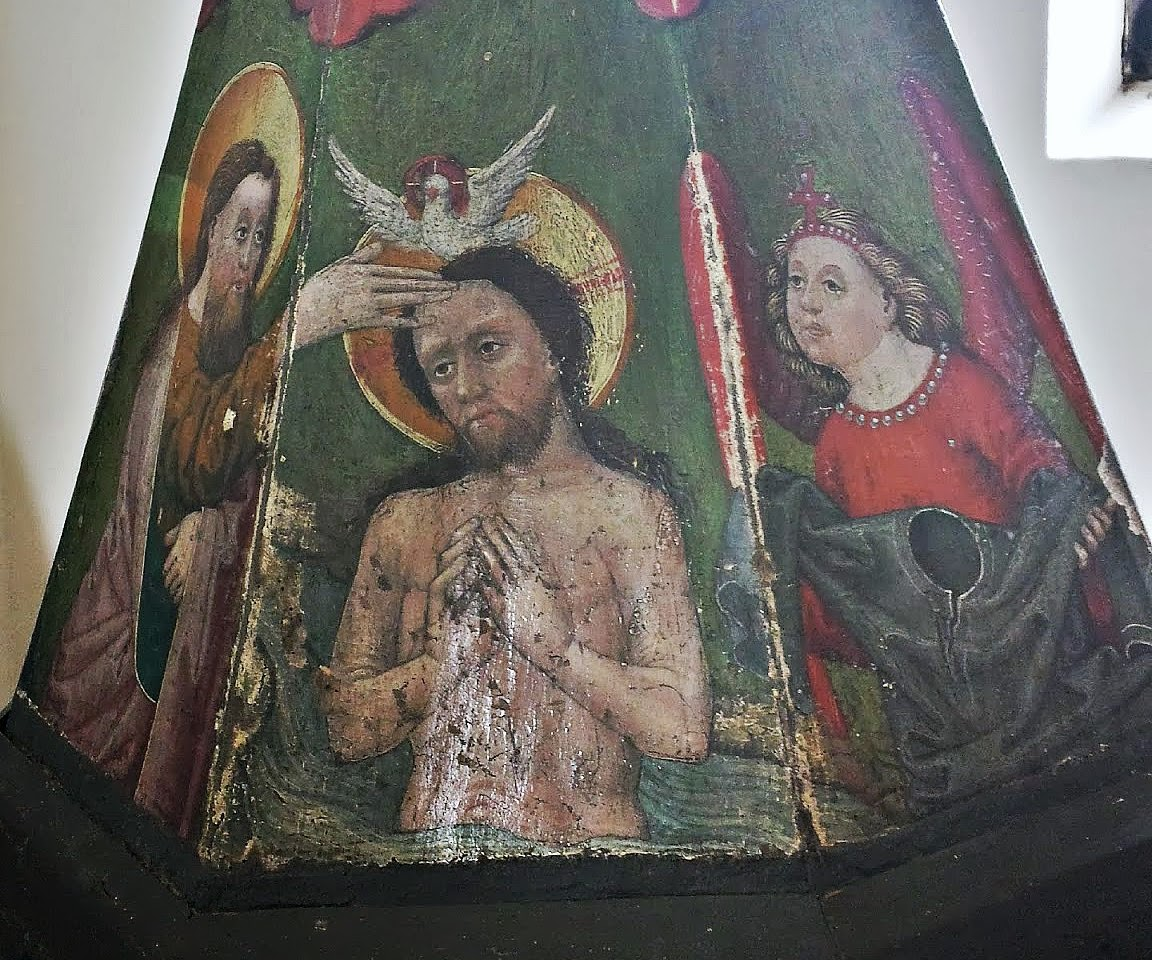 Taufe Christi - spätgotische Darstellung am hölzernen, pyramidenförigen Aufsatz des Taufbeckens in der Kirche von Sternberg. Die Malereien wurden um 1490 erstellt.